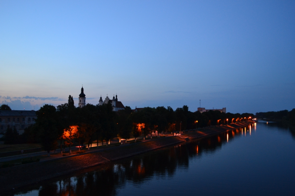 Беларуская (тарашкевіца): Ансамбль былога кляштара францысканцаў у межах агароджыдэкаратыўнае ўбраньне касьцёла:6 алтароў са скульптурай амбонроспісы скляпеньняў2 фрэскі ў бакавых алтарах. г. Пінск This is a photo of Belarusian heritage monument. Reference number: 111Г000538 ( WLM)